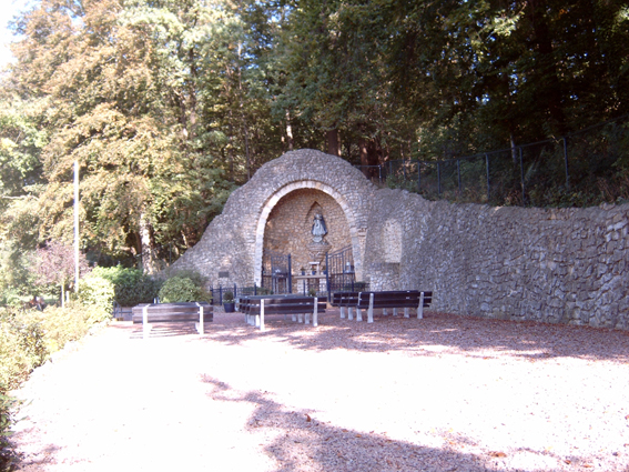 Gemaakt door Noud Verbiesen